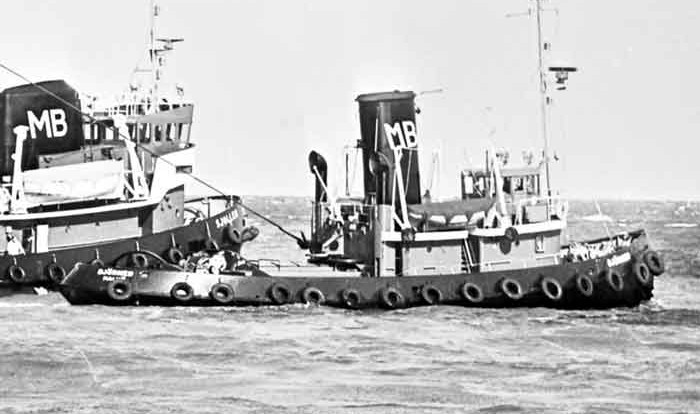 Bogserbåten Björnen med Malmö Bogserings AB (MB) på skorstenen